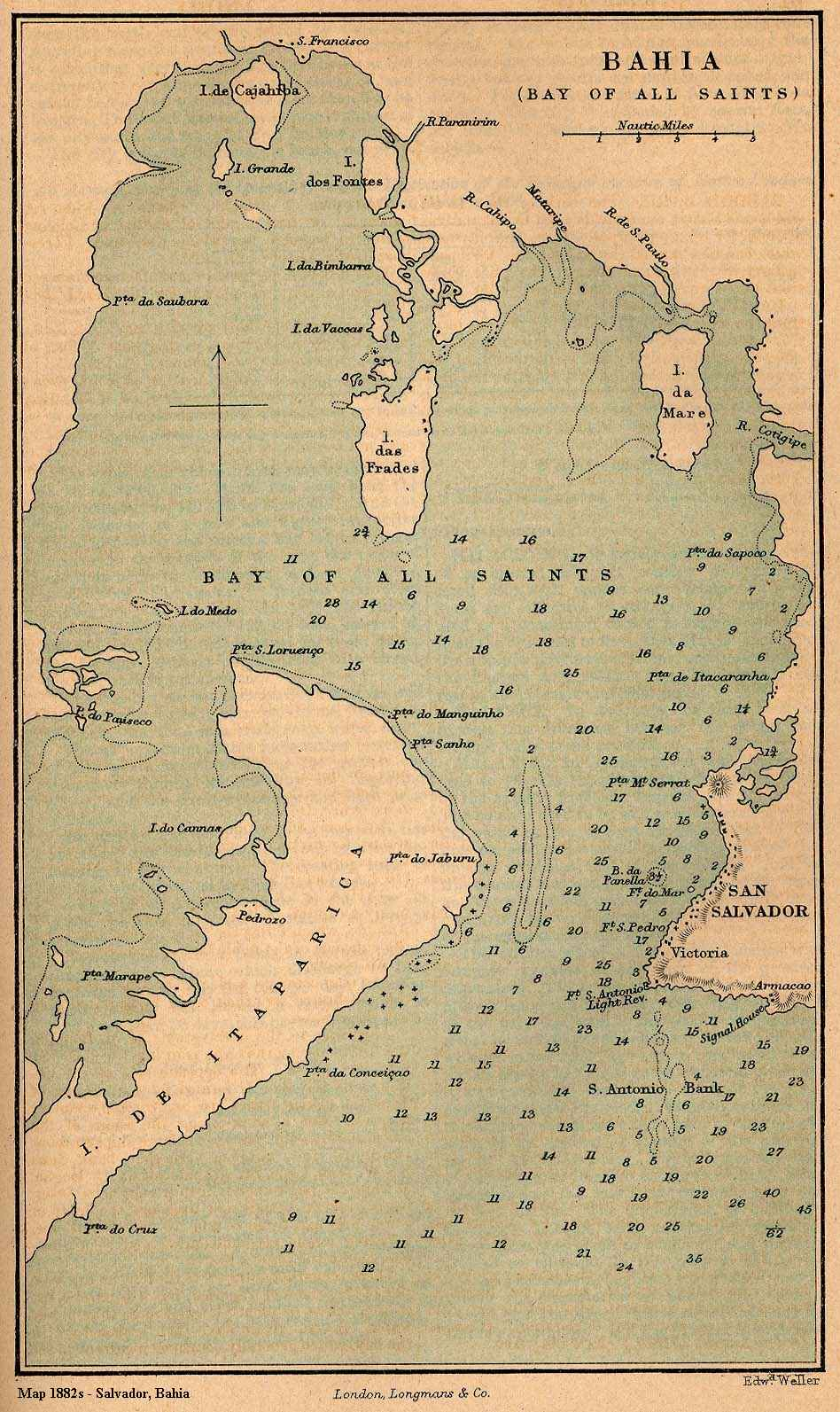 Bahia - Bay of All Saints (Baía de Todos os Santos)